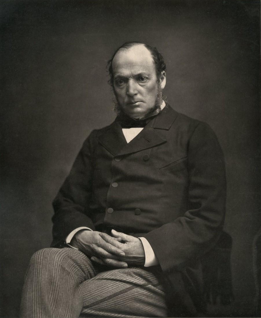 Portrait d’Émile de Marcère